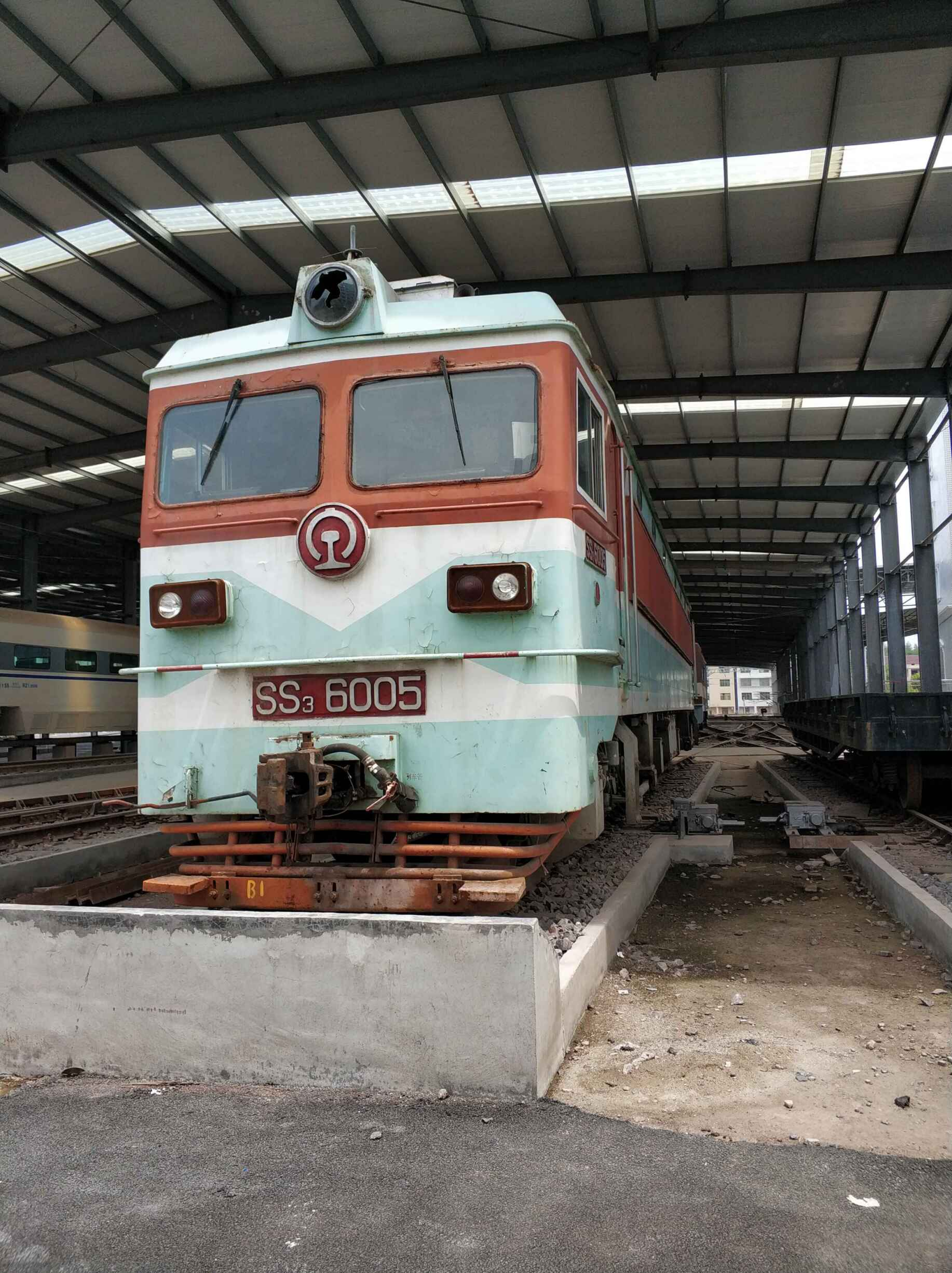 中文（中国大陆）: 存放于湖南交通工程学院的SS3_6005